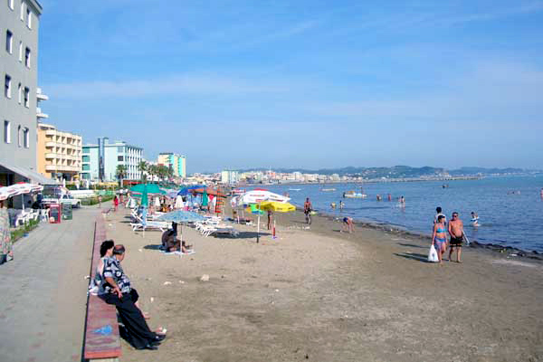 Durrës